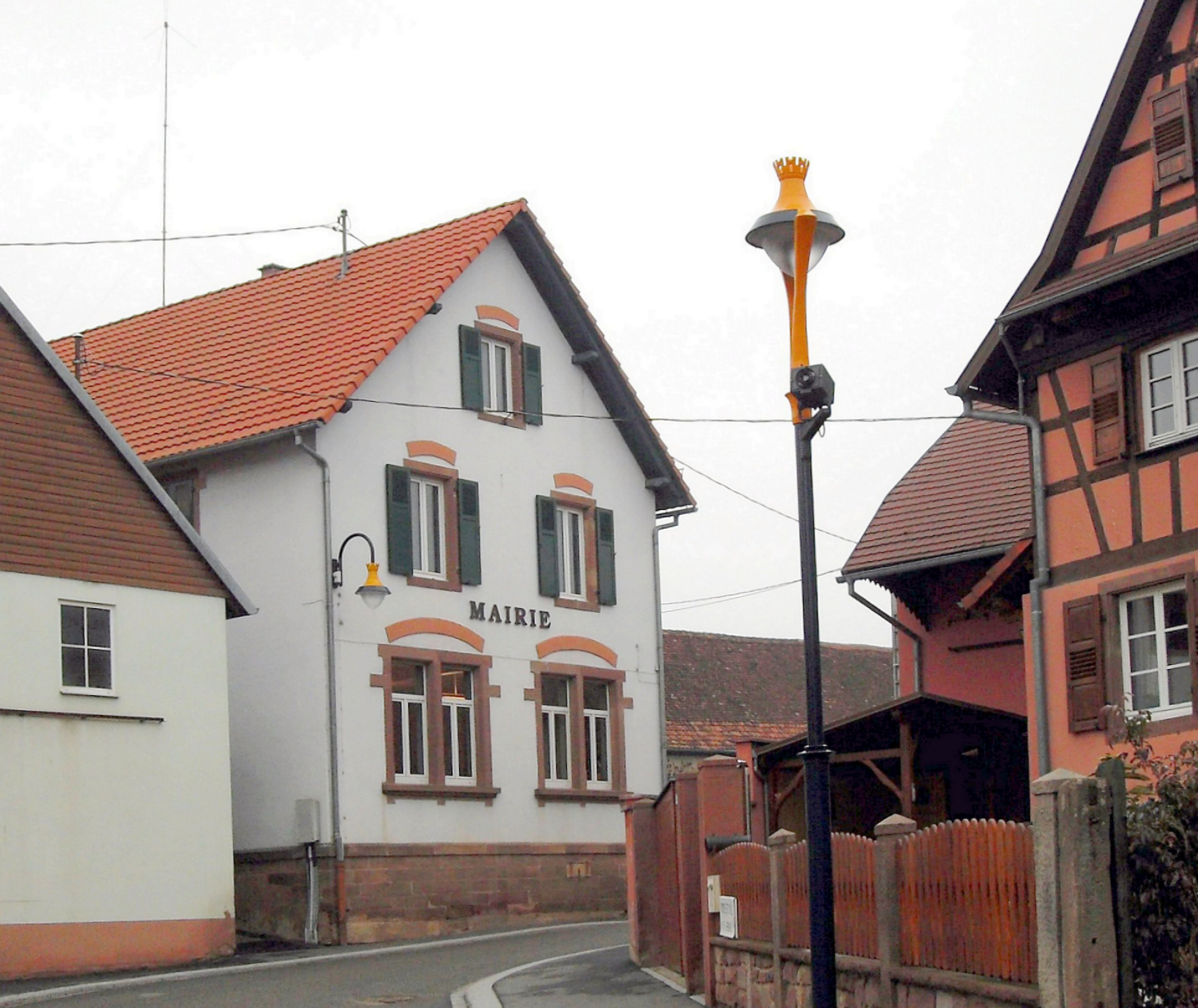 La mairie de Knœrsheim